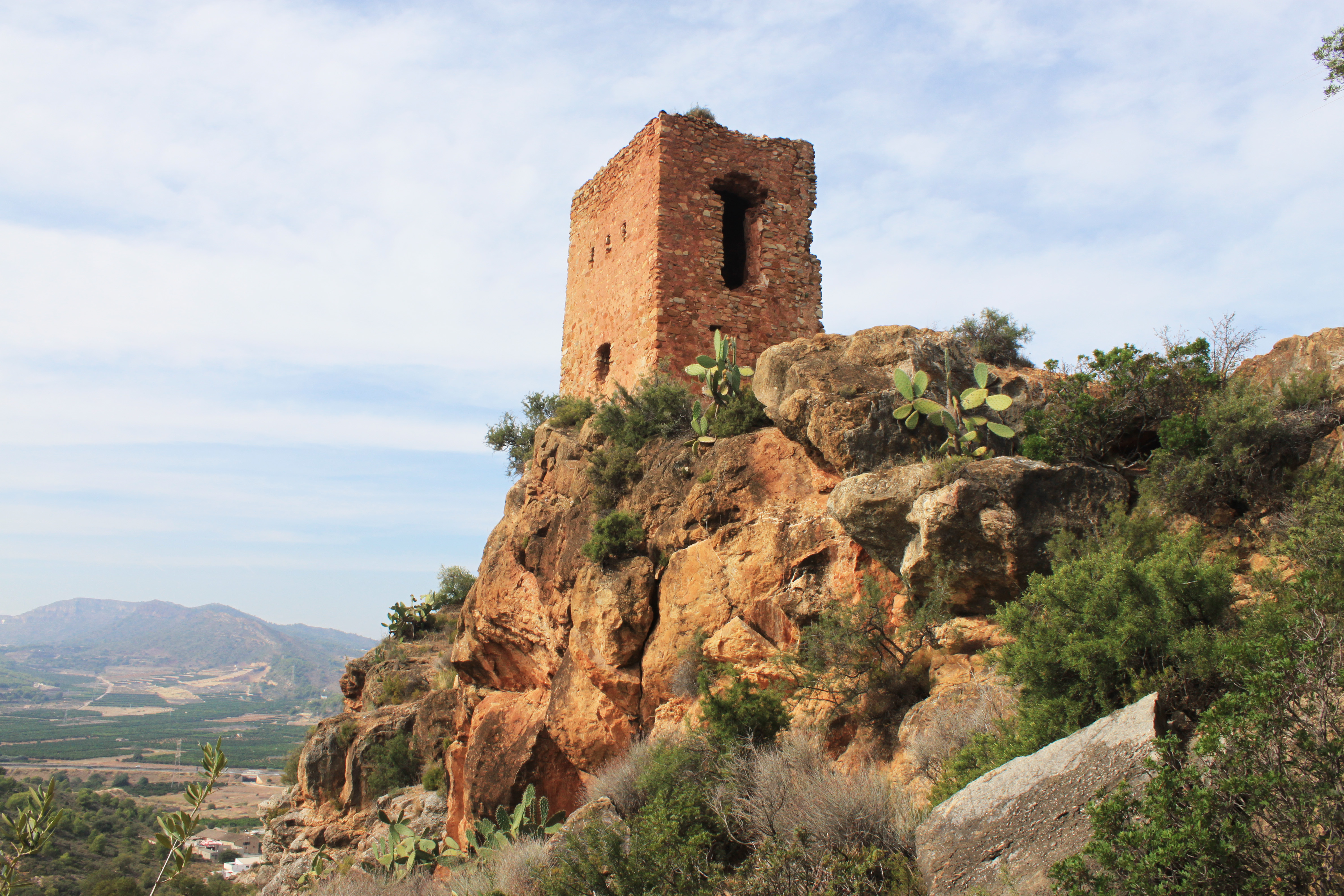 Torre de Bivalcadim llamada localmente L'Agüelet situada al oeste de la ladera sobre la que se asienta el castillo de Almenara. Almenara, provincia de Castellón, Comunidad Valenciana. Esta fortificación protegía el acceso principal al castillo.